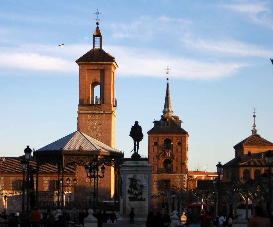 Plaza de Cervantes, Alcalá de Henares, Comunidad de Madrid, Spain.